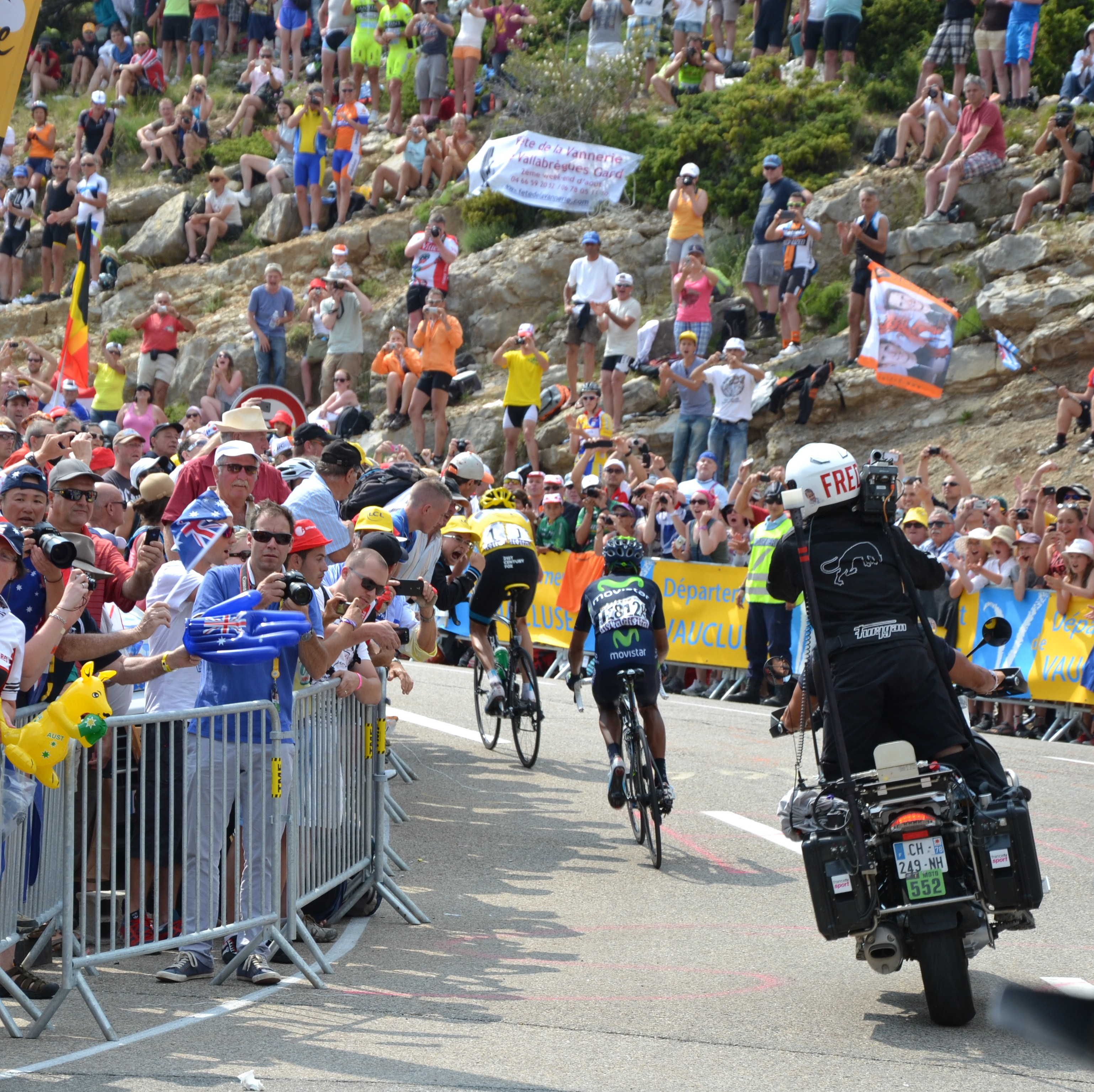 Christopher Froome et Nairo Quintana, au Chalet Reynard, Mont Ventoux, lors de la 15ème étape du Tour de France 2013